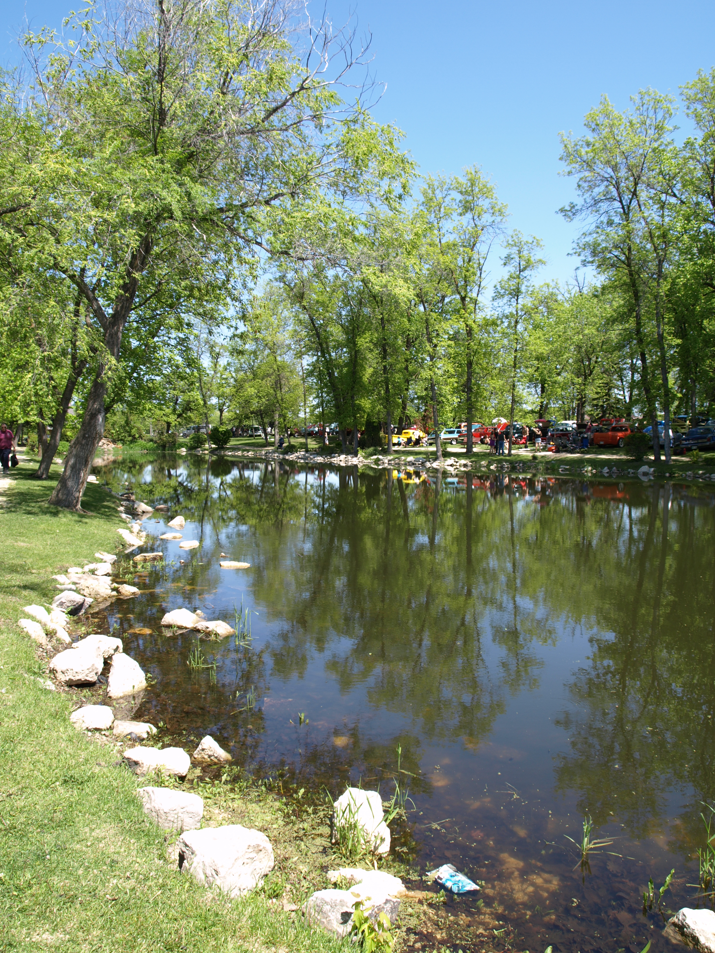 Portage La Prairie Manitoba Canada